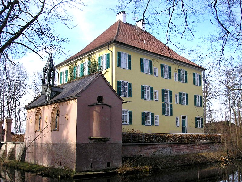 Schloss Unterwittelsbach bei Aichach (Landkreis Aichach-Friedberg, Bayerisch-Schwaben). Gesamtansicht. Eigene Aufnahme, Februar. 2007 / Unterwittelsbach castle near Aichach (Bavaria, Germany). Total view. Own photo, Feb. 2007